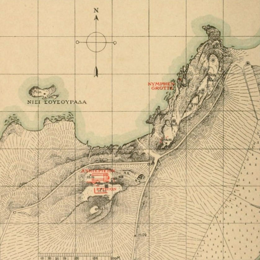 Detailkarte der Lageskizze des Asklepieions und des Pythions auf Paros von 1901, Kykladen, Griechenland